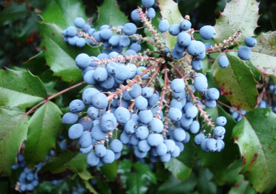 Mahonia aquifolium - ripe fruits